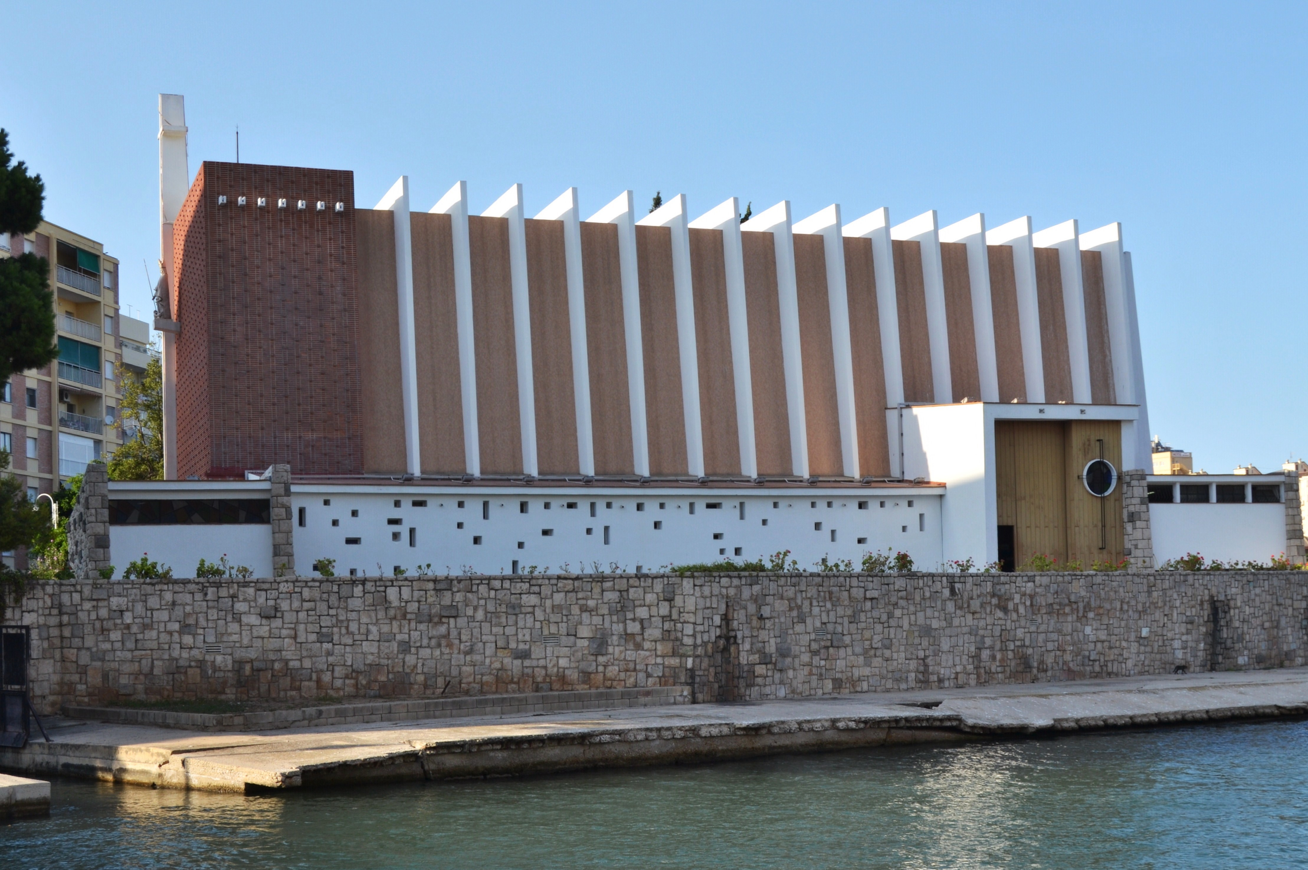 Església de Sant Nicolau del Grau de Gandia.